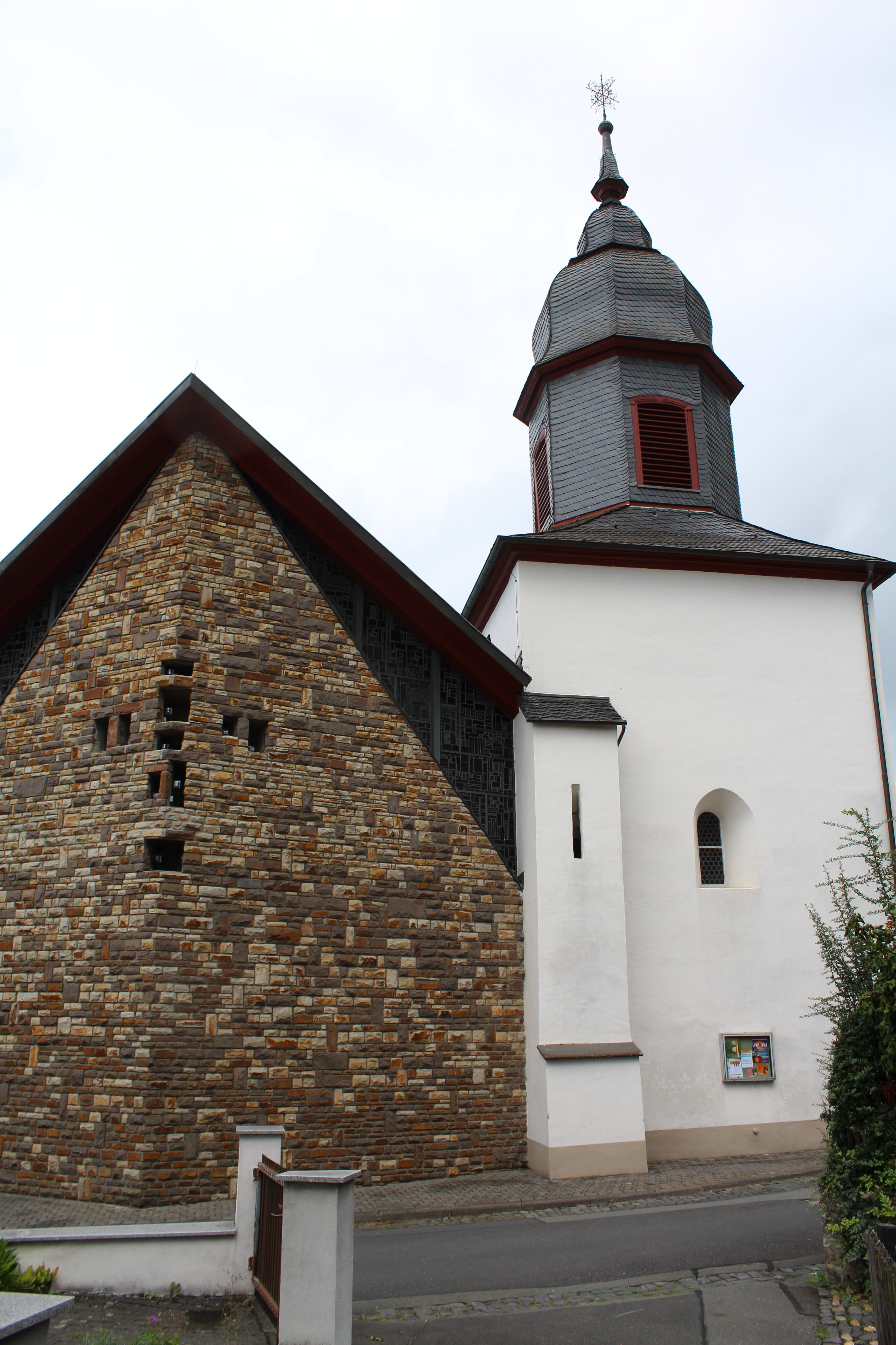 Evangelische Kirche Katzenfurt, Lahn-Dill-Kreis, Hessen, Deutschland